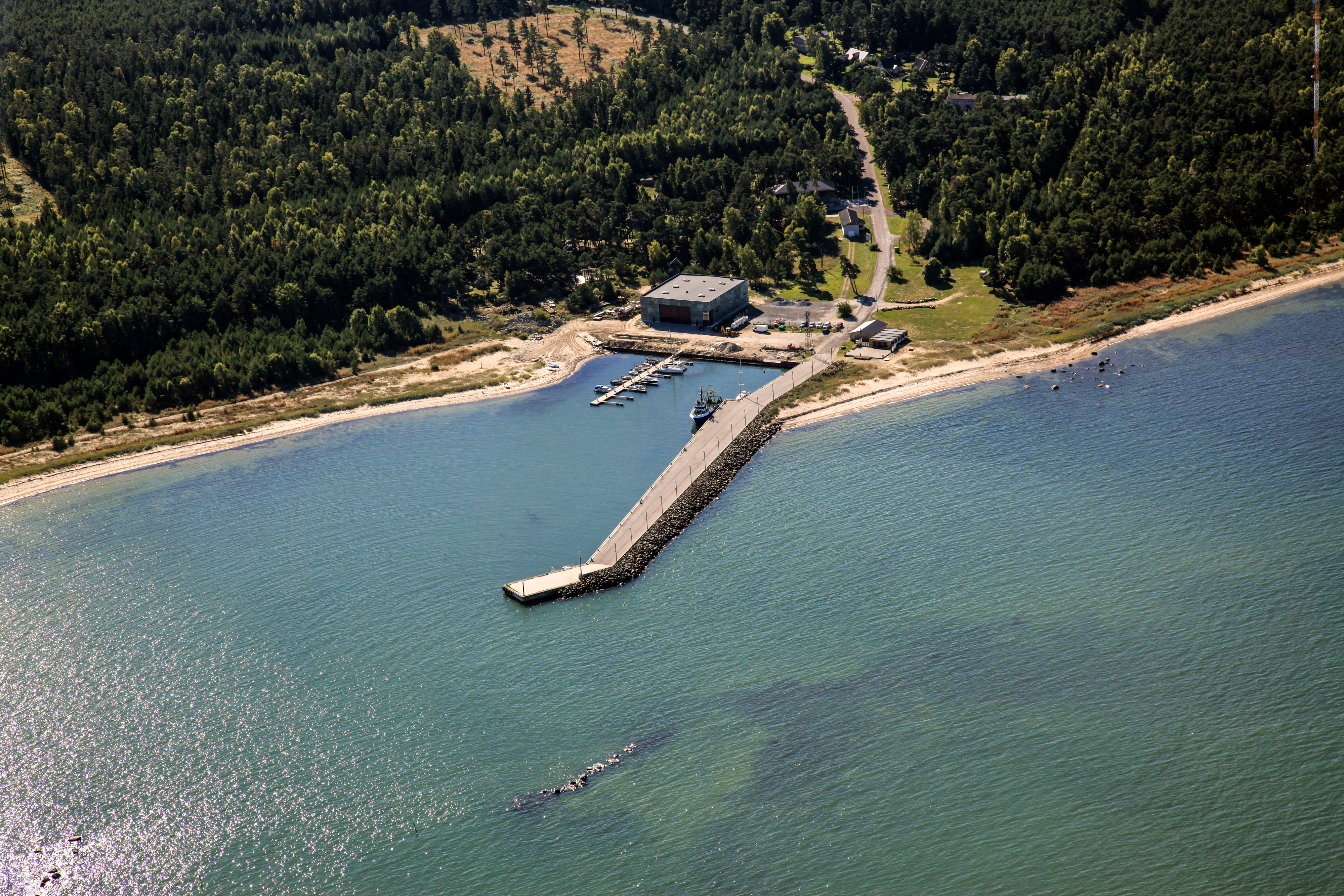 Dirhami sadam 2015